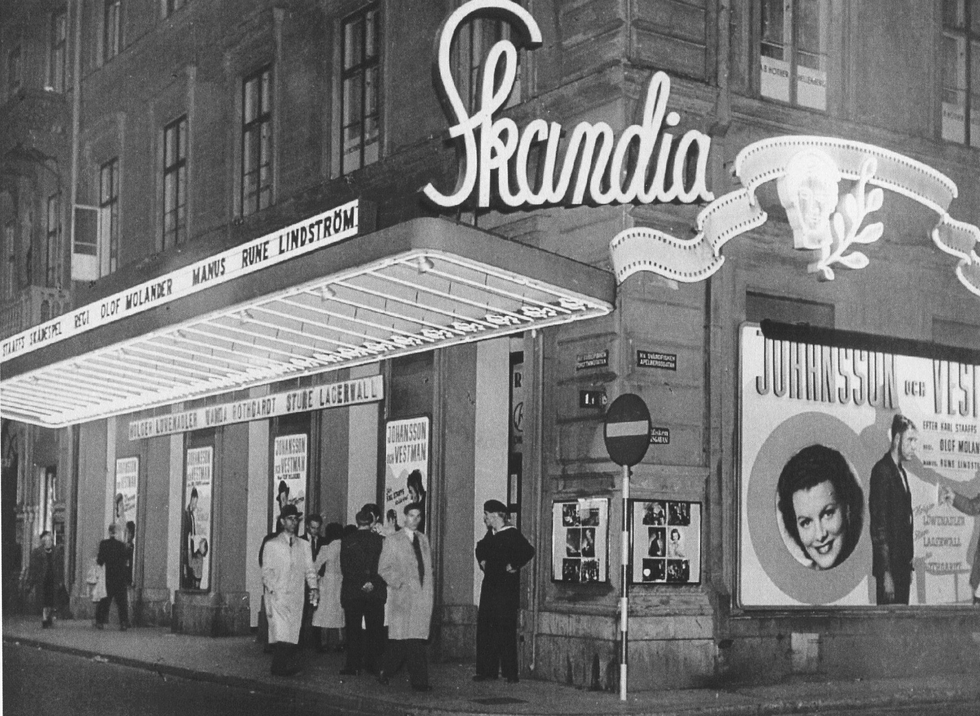 Biografen "Skandia" i Stockholm, entrén